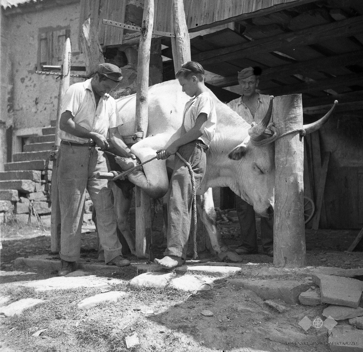 Kovač Vene Sabadin, Krmci, podkuje vola (istrijanske pasme). Vol stoji v "štantu".